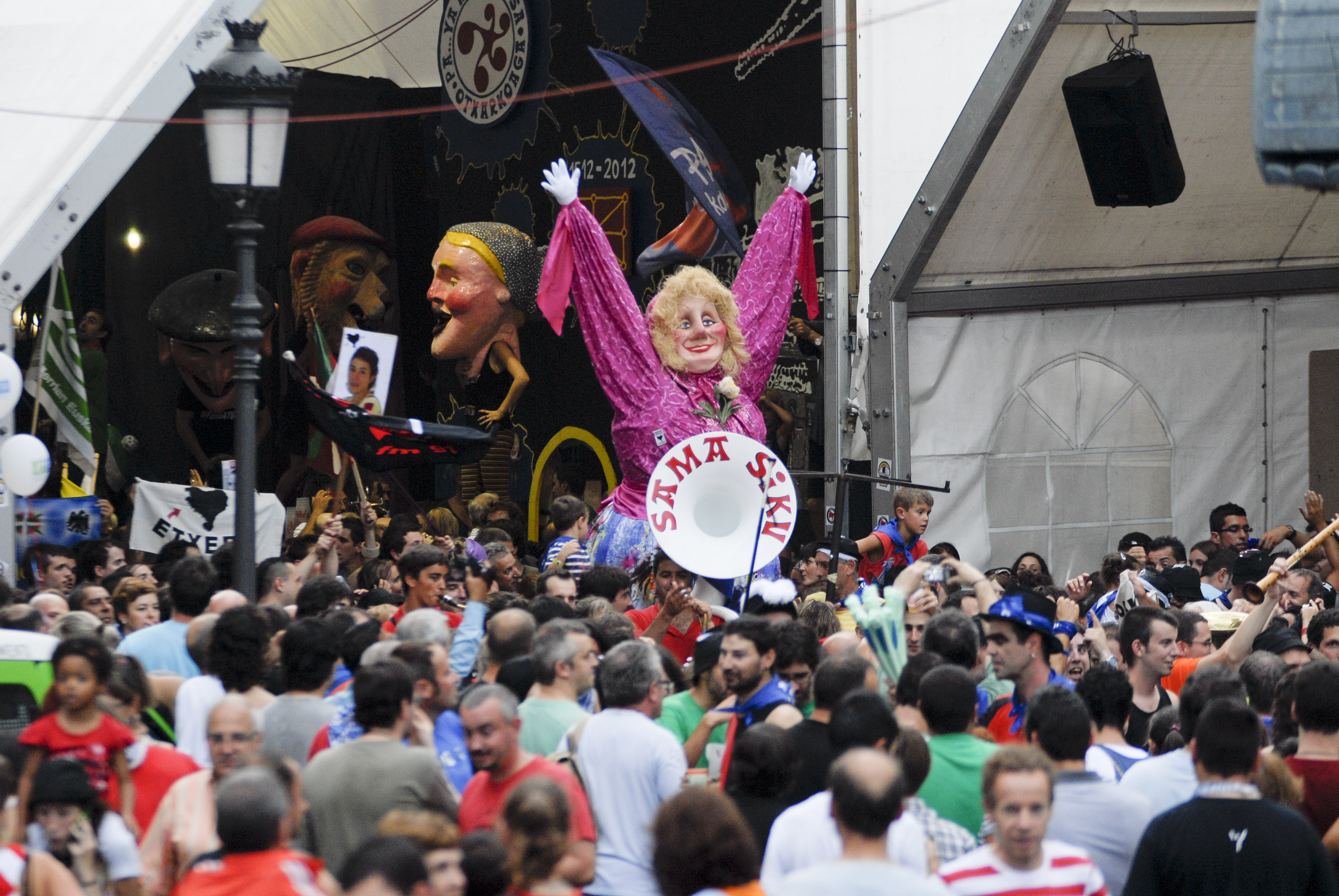 Larunbata20-87